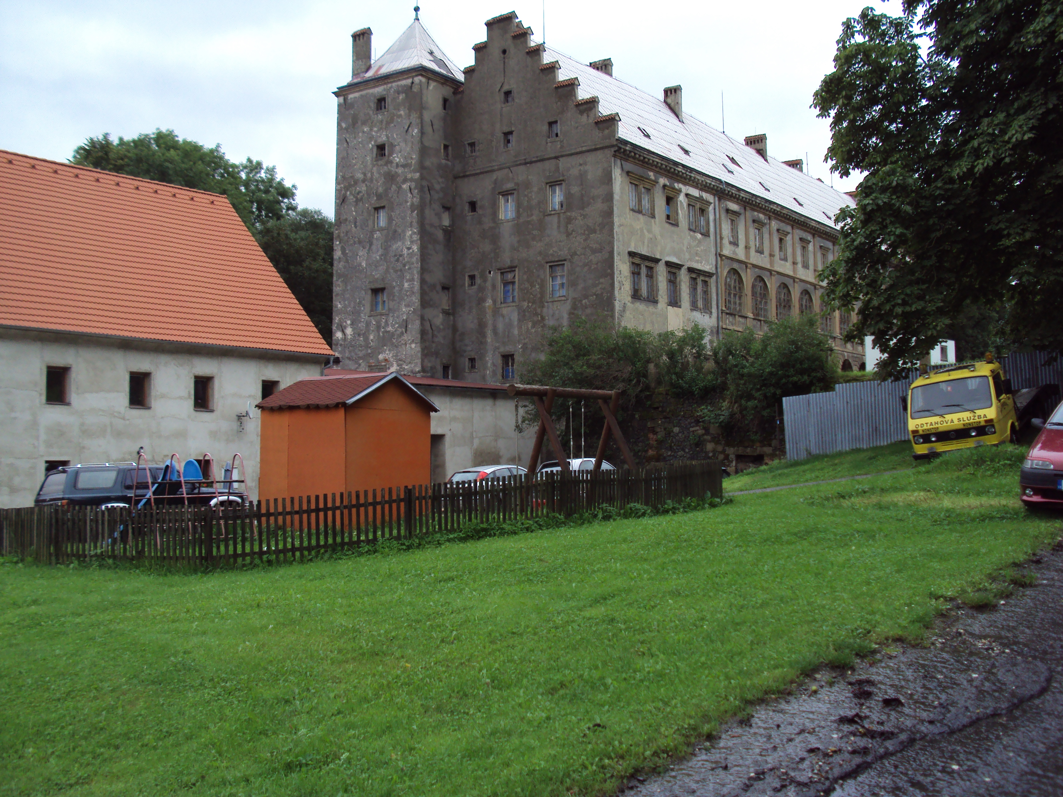 Zámek v Horní Libchavě, uzavřený